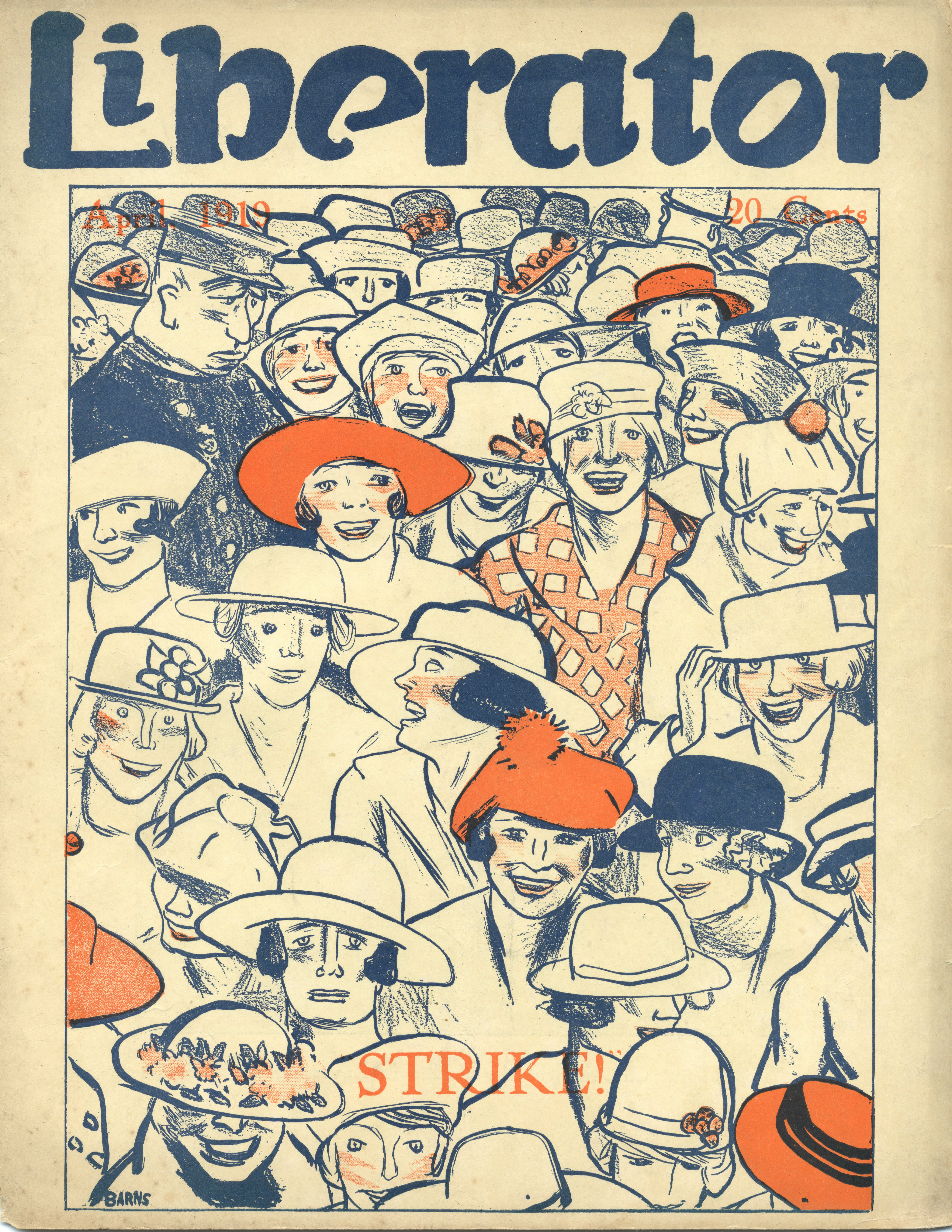 Portada del número de abril de 1919 de The Liberator.